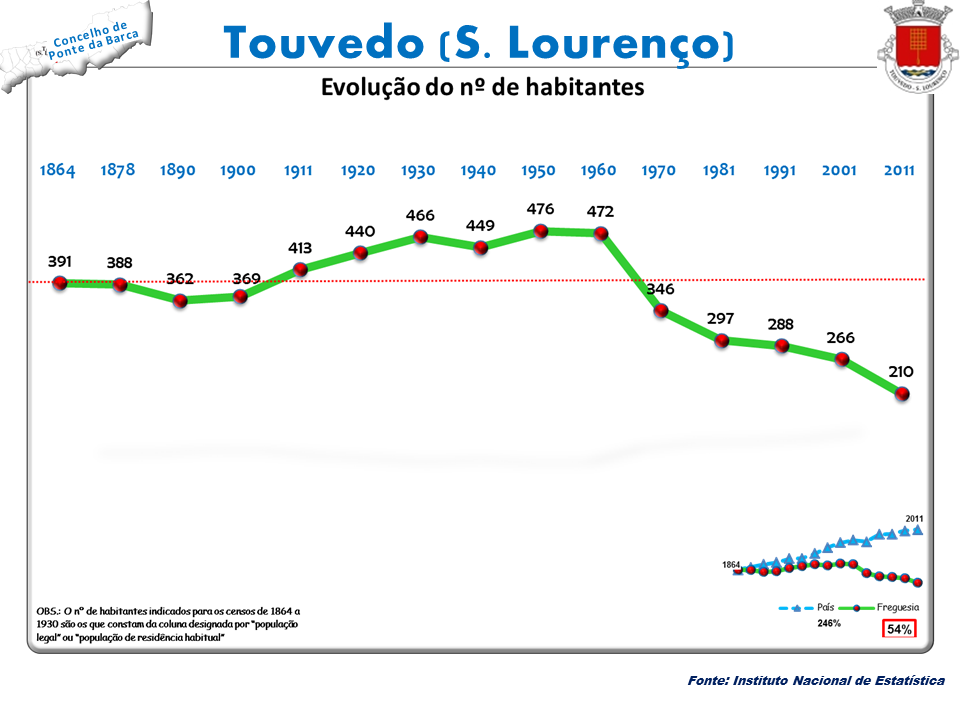 Censos 1864/2011